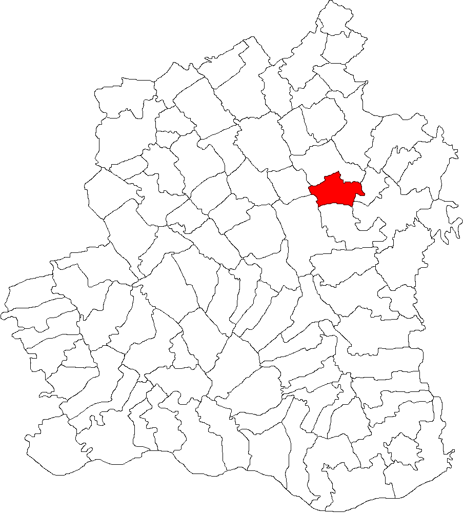 Categorie:Hărţi ale judeţului Teleorman